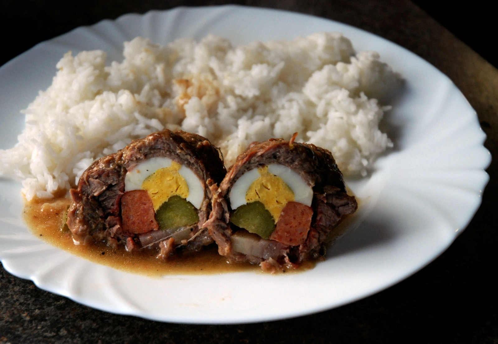 Španělský ptáček s rýží